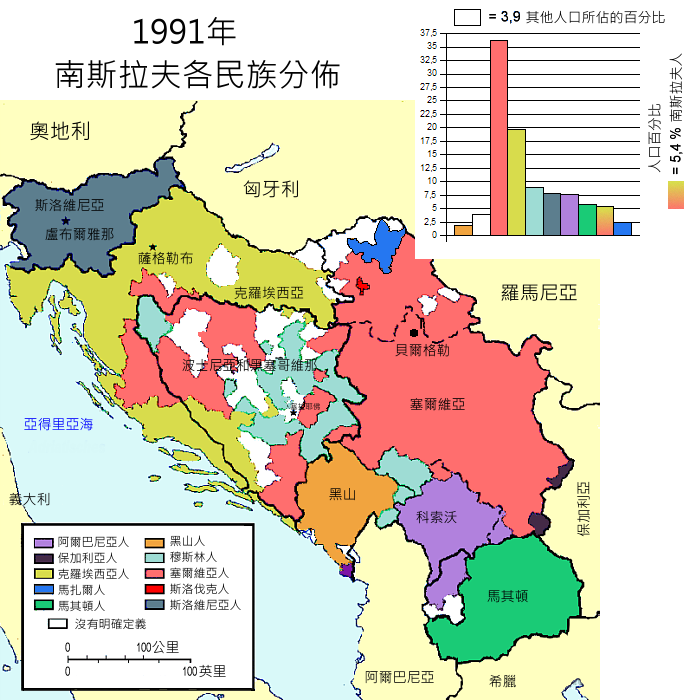 南斯拉夫民族分佈圖（繁體中文版）